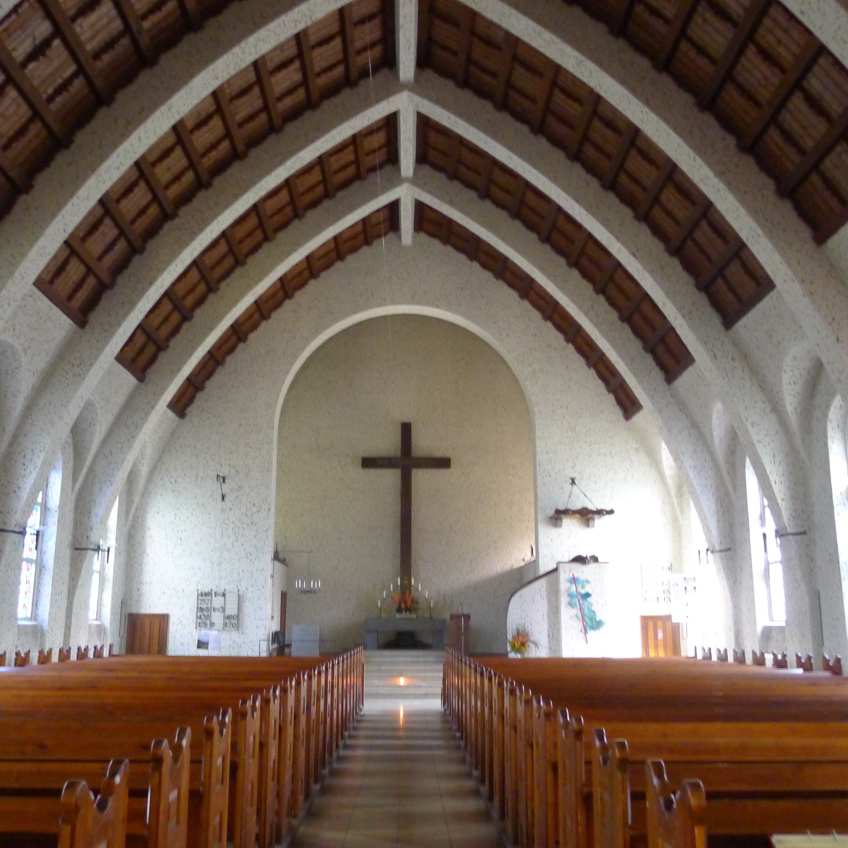 Blick zum Altar